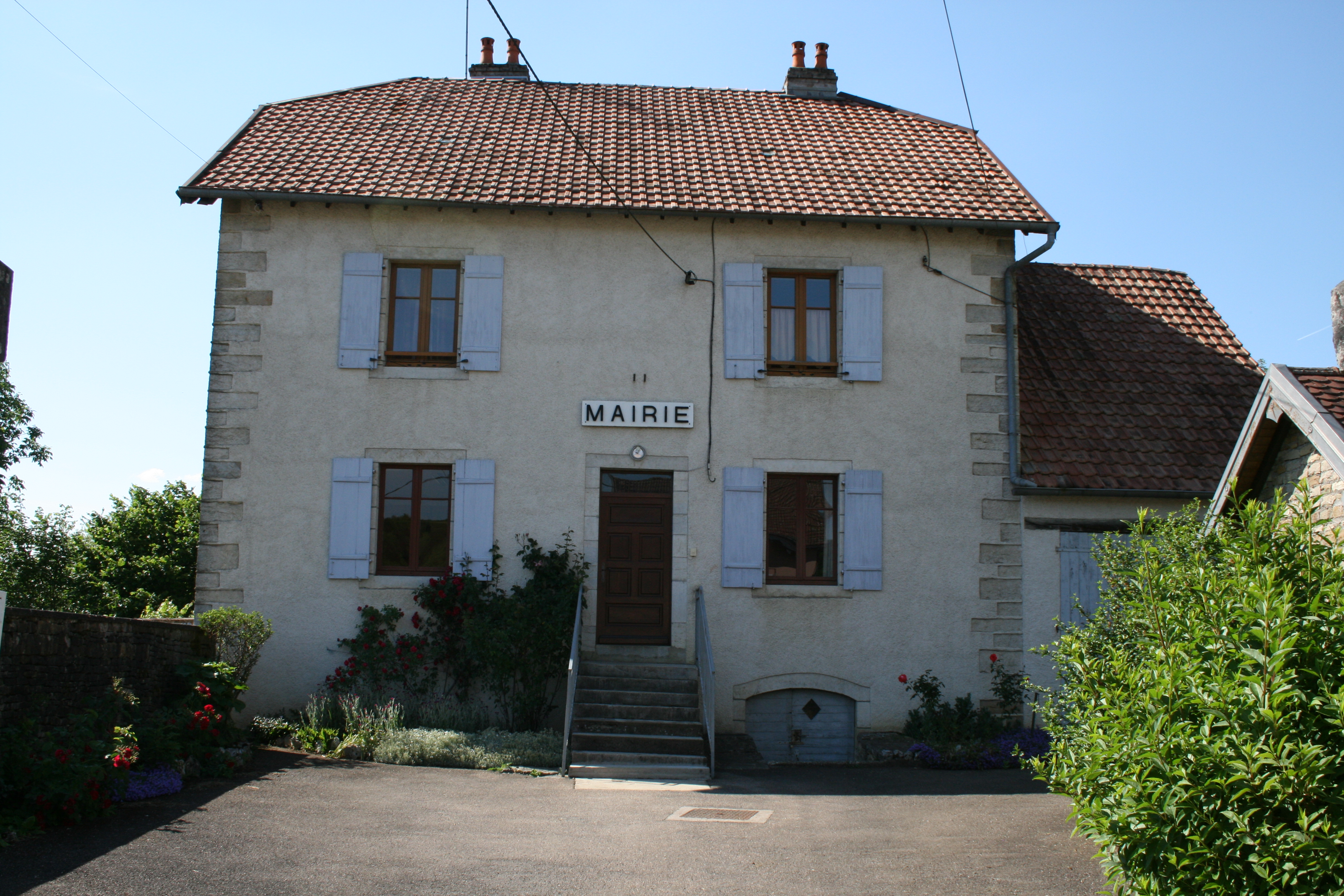 Autrey-les-Cerre ( Haute-Saône ) vue de la mairie